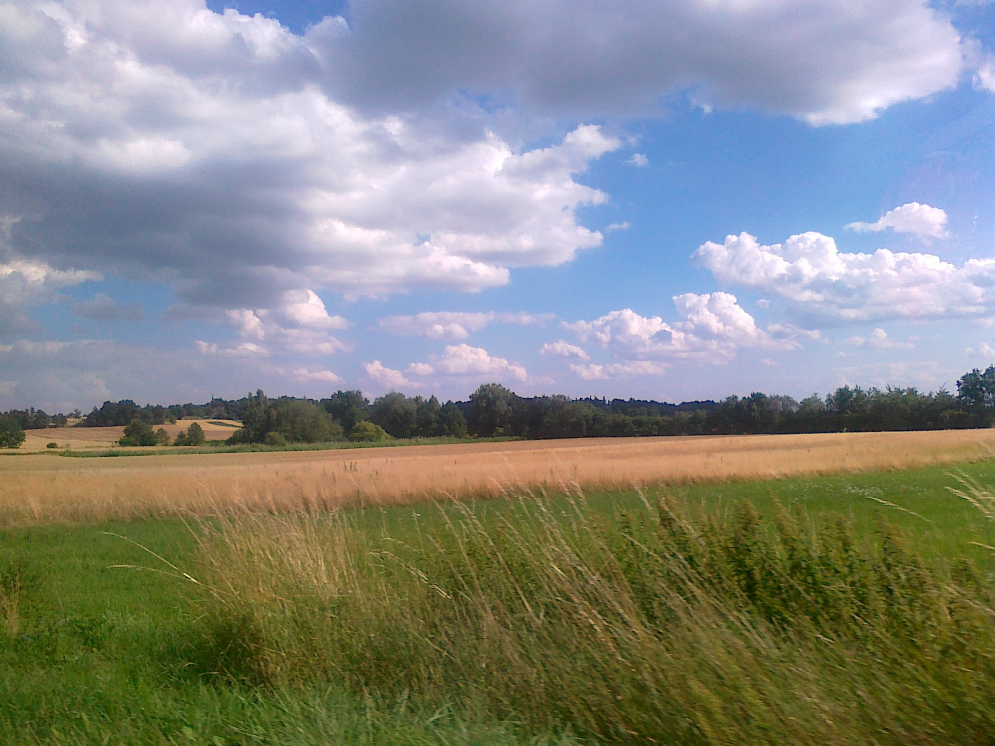 Krajobraz